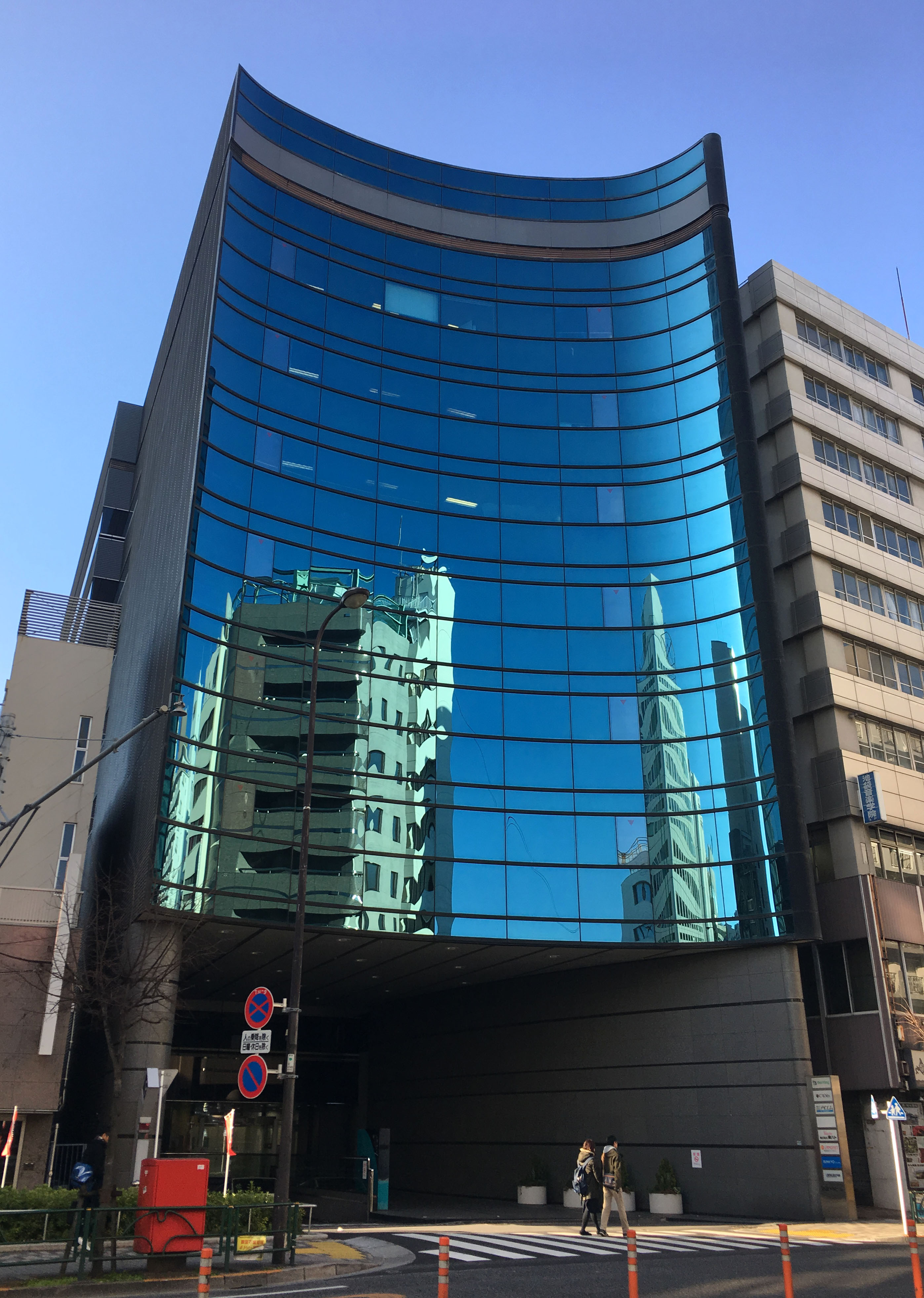 東ハト本社が入っているビル（池袋YSビル）